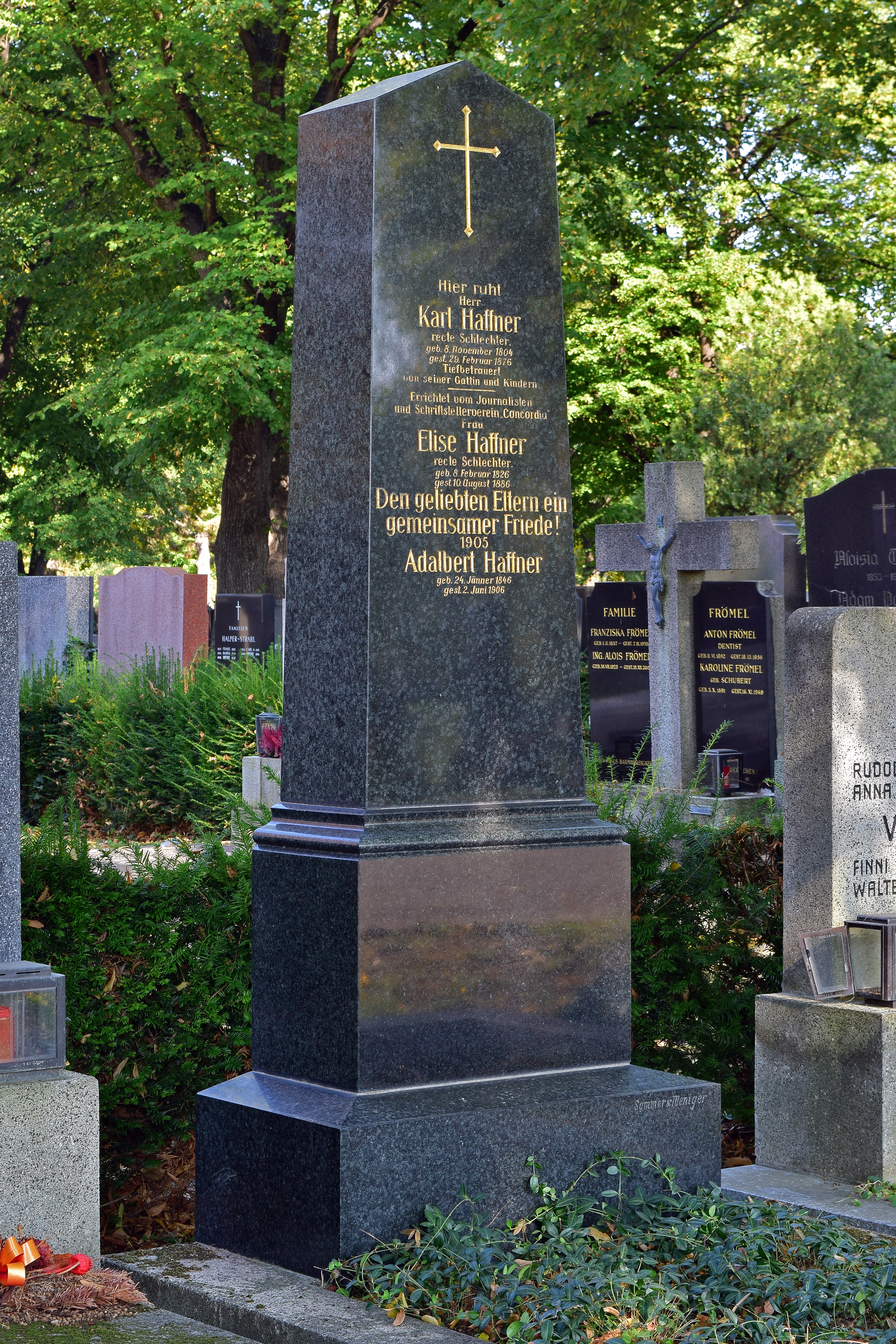 Ehrenhalber gewidmetes Grab von Karl Haffner auf dem Wiener Zentralfriedhof, Gruppe 3, Reihe 4, Nr. 41